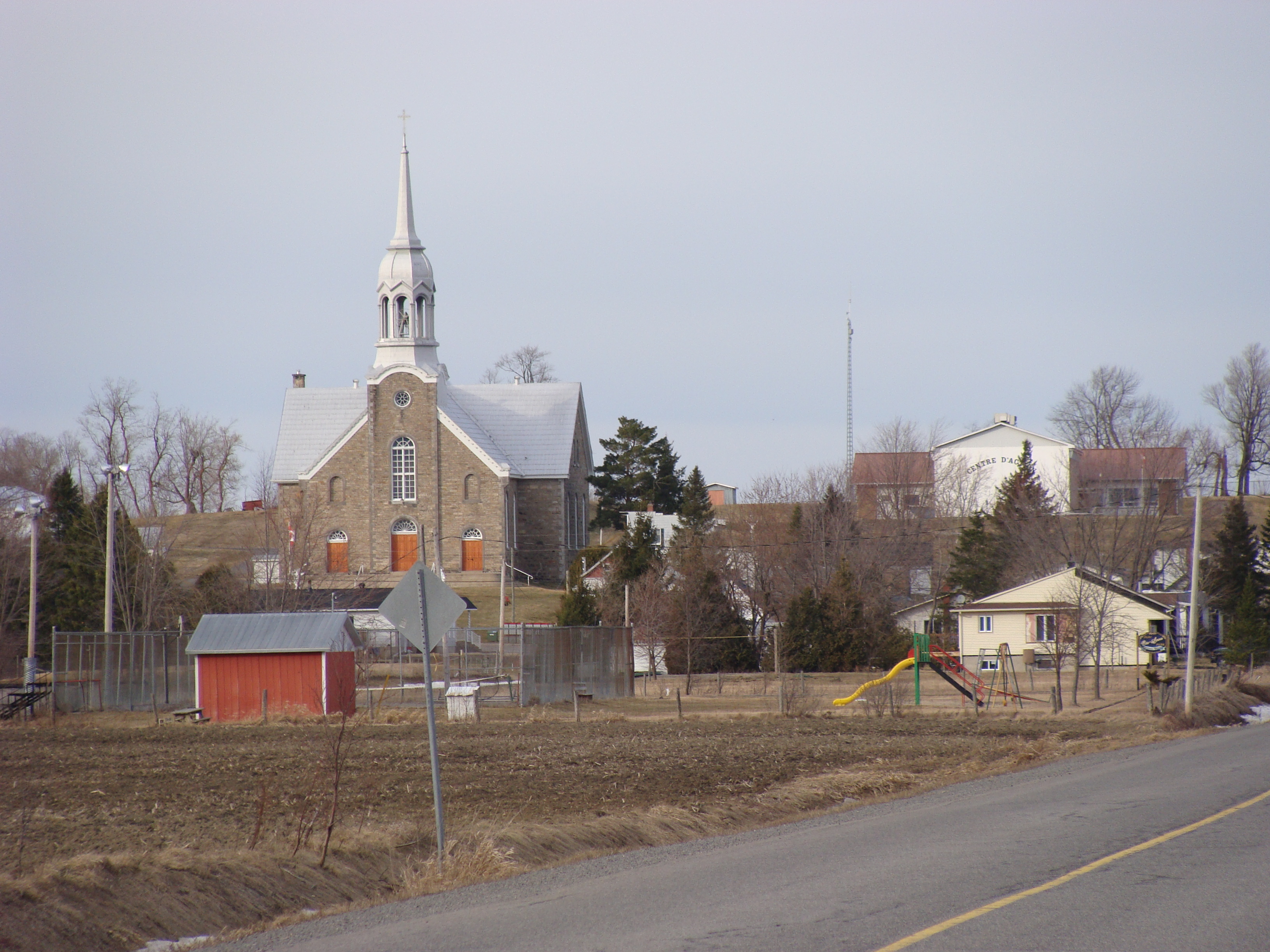 Photo du village de Ste-Anne-de-Prescott en arrivant par le sud.